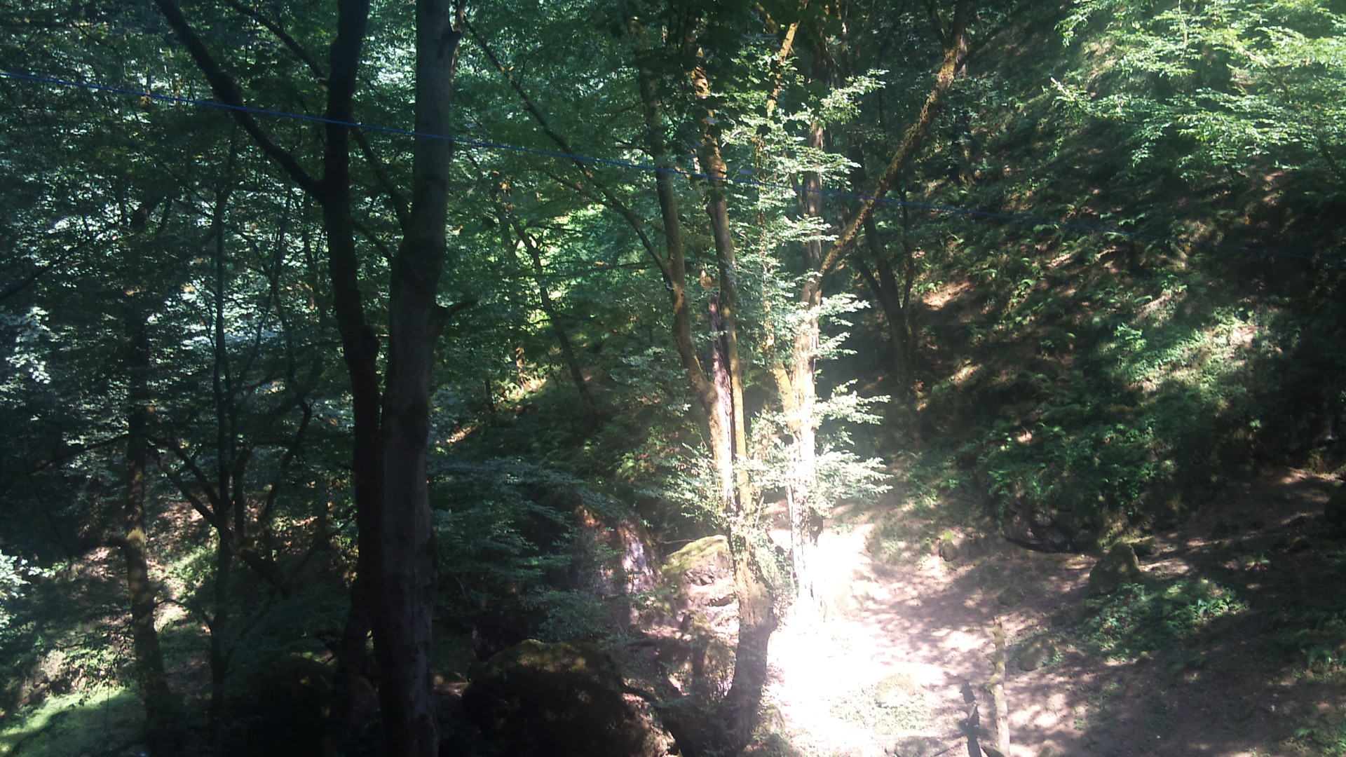 جنگل گیلان